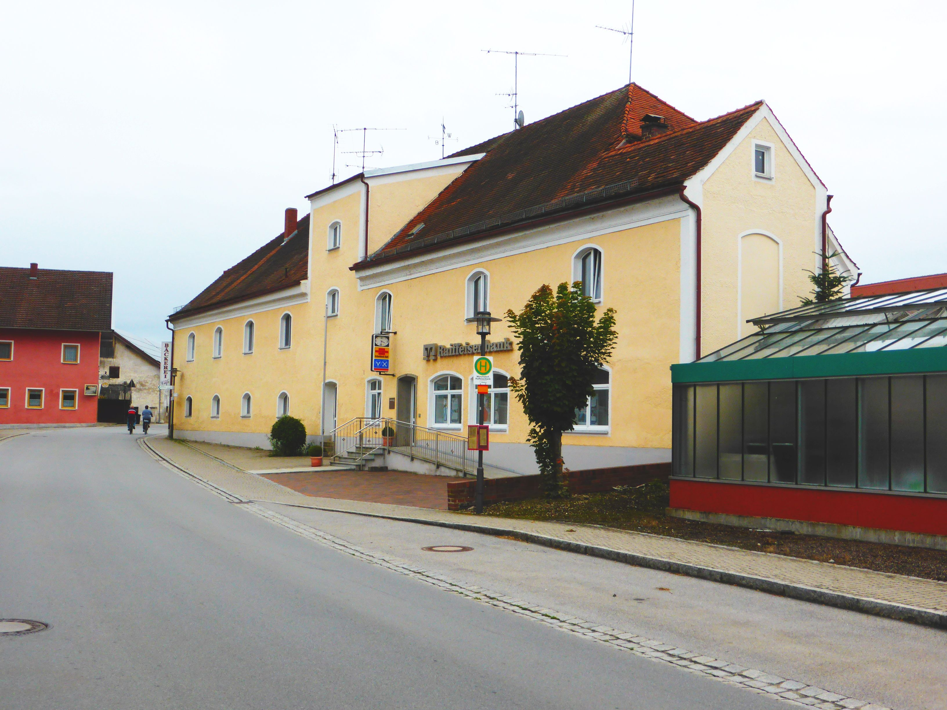 Schloss Münchsdorf